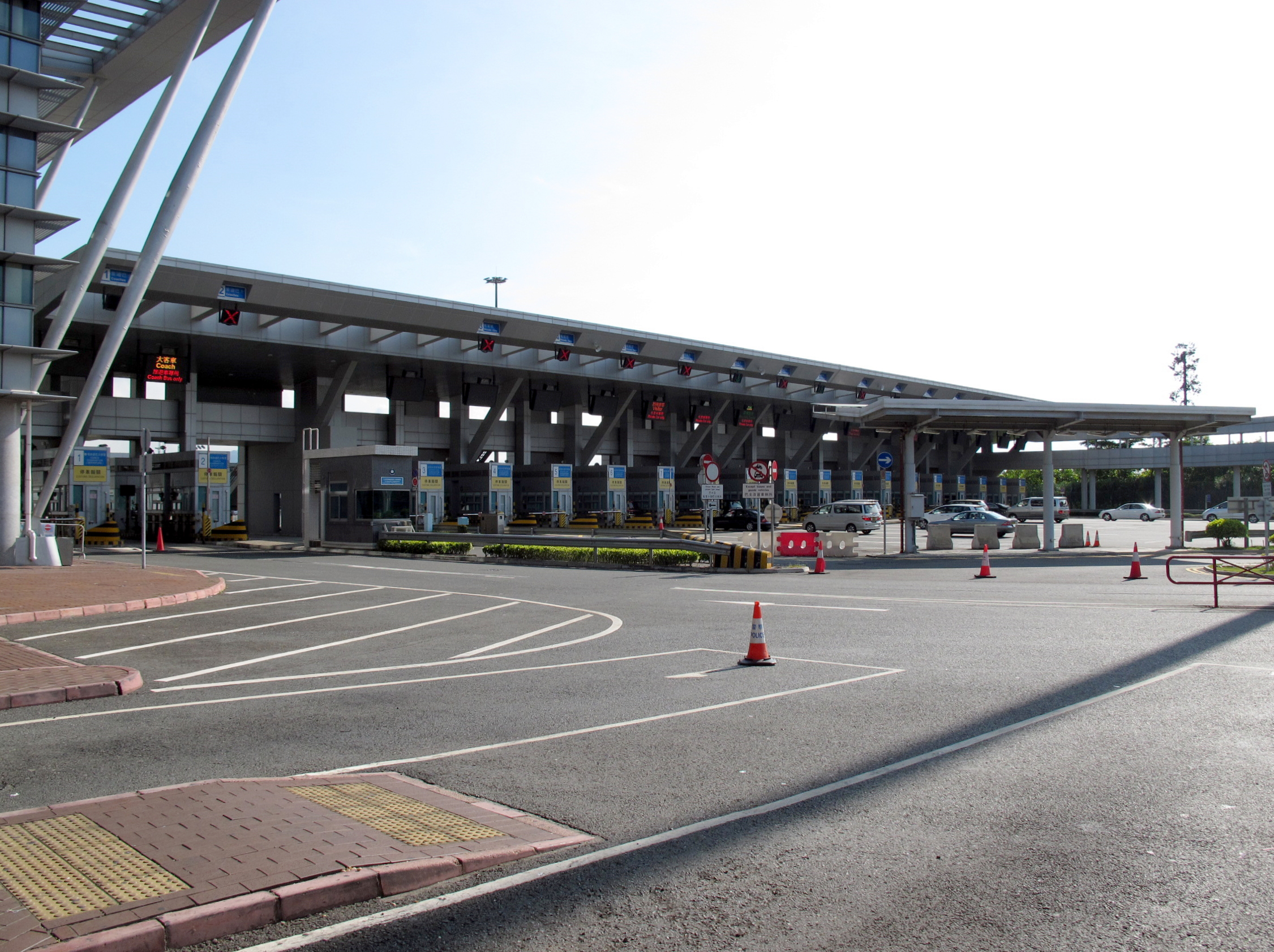 Shenzhen Bay Port Passenger Terminal